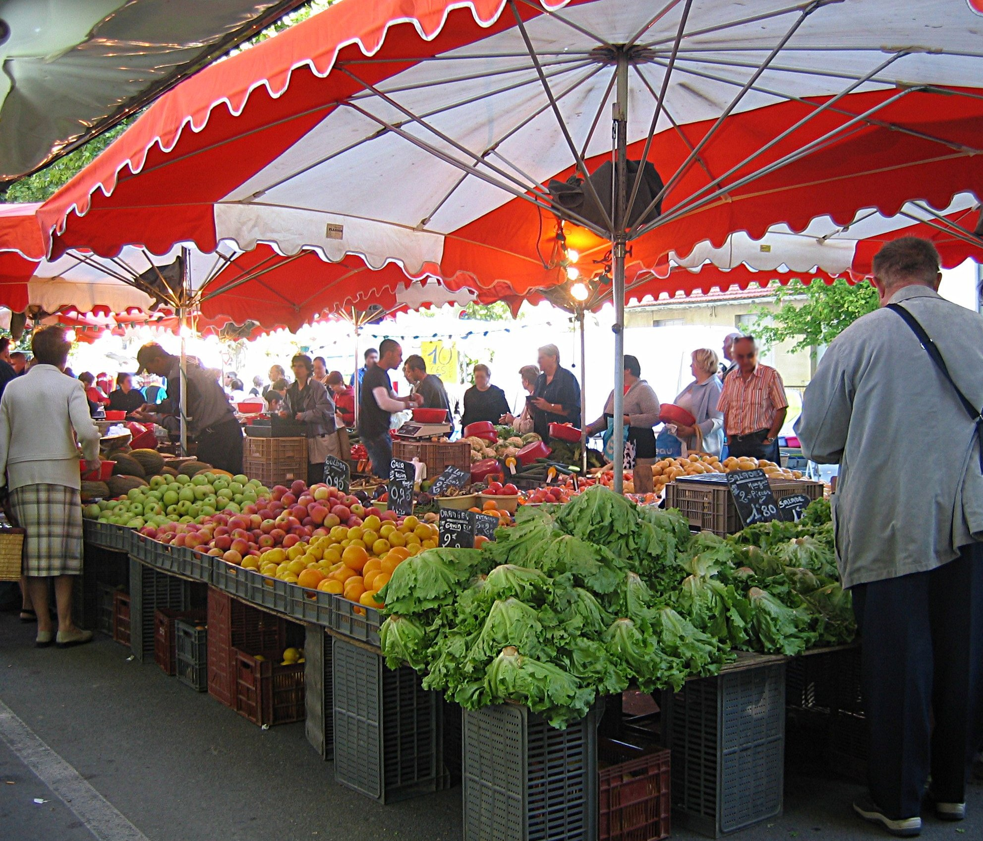 Le marché à Mauguio permet aux nombreux maraichers locaux de vendre leurs produits à proximité. Du fait de sa réputation grandissante, le marché évolue vers une clientèle plus urbaine de toute l'agglomération montpelliéraine. Note : Les visages reconnaissables ont été floutés.